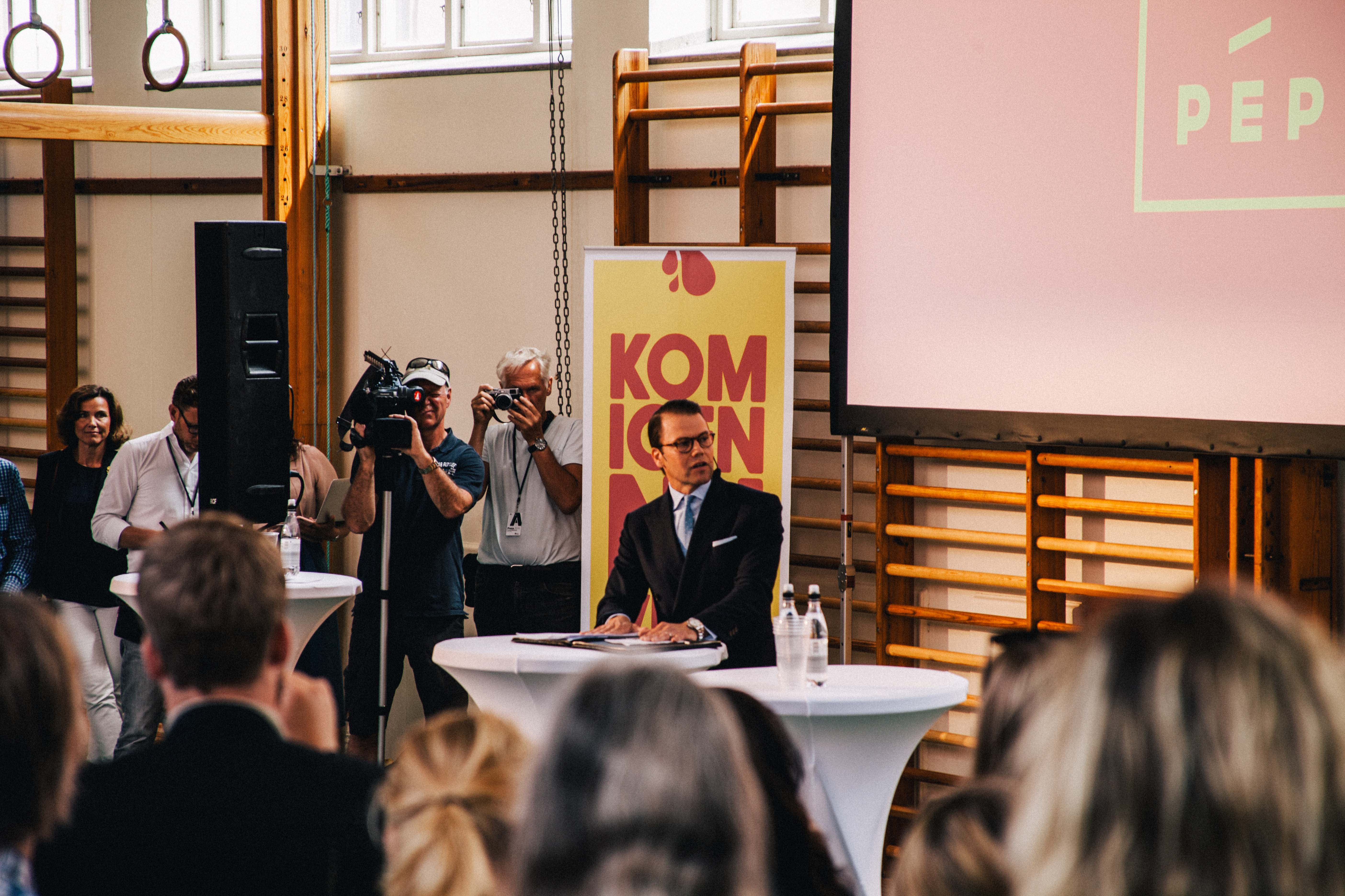 Prins Daniel vid lanseringen av initiativet GEN-PEP i Almedalen 2016